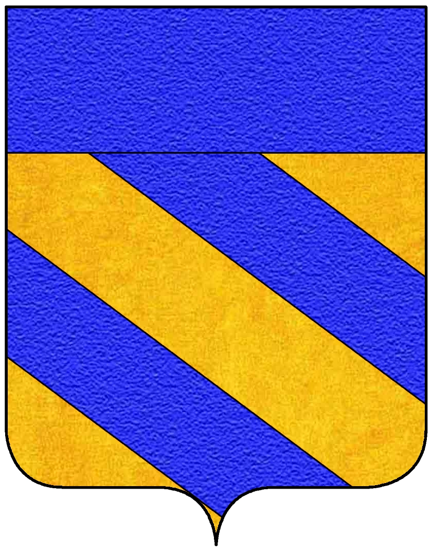 Stemma della famiglia Gozze